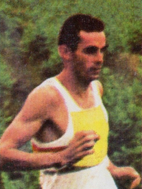 CAMPIONI dello SPORT 1973/74-Figurina n.381- BALCZO - UNGHERIA -PENTATHLON-Rec